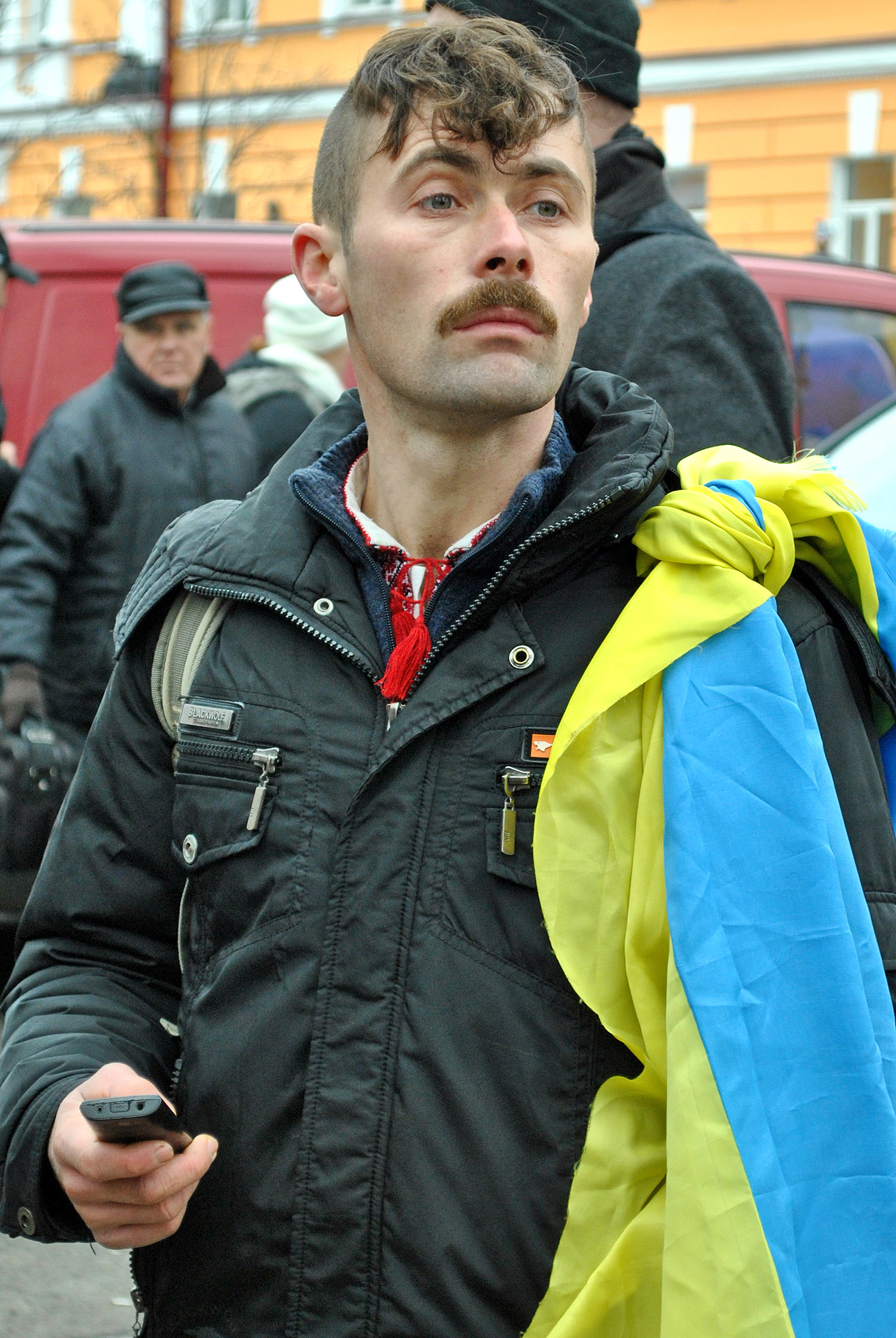 Український фермер, громадський активіст, член партії ВО «Свобода» Олександр Анатолійович Капінос (1984—2014) на марші в Києві 1 грудня 2013 року.